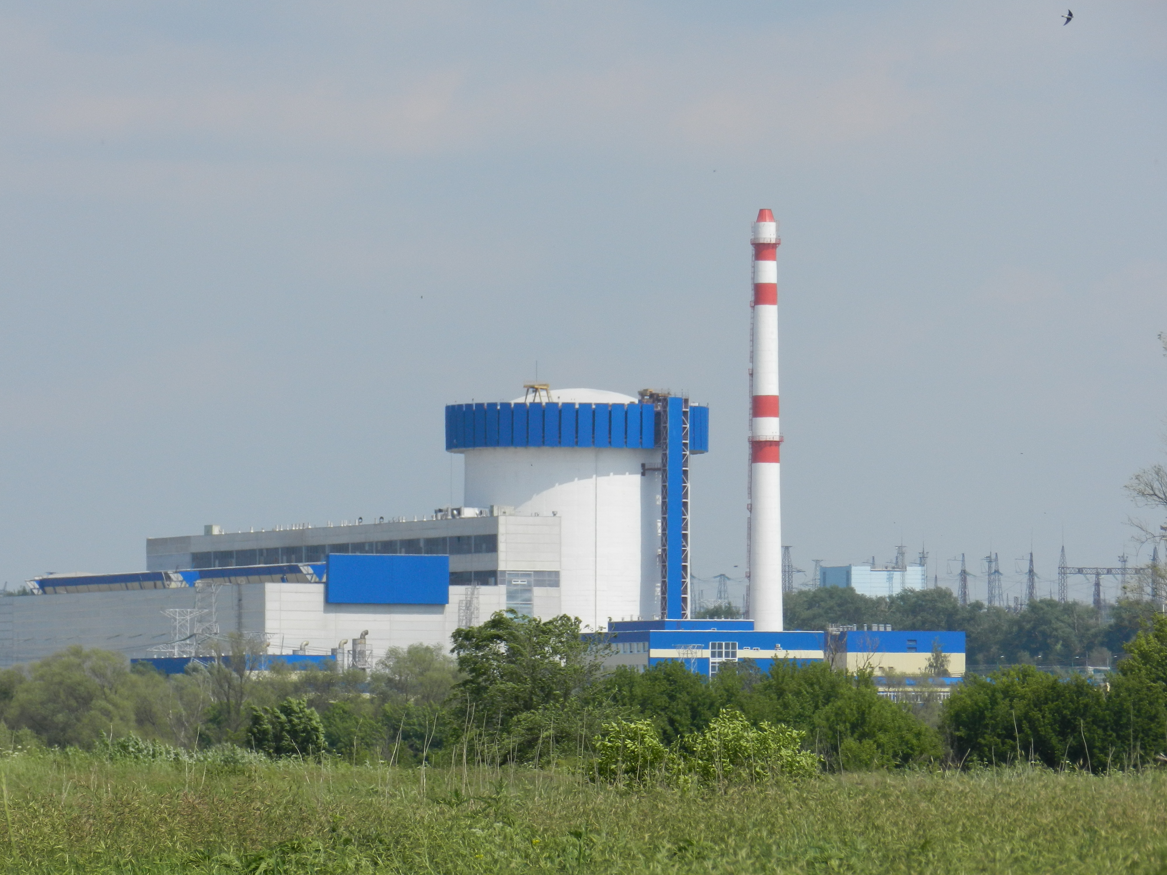 Нововоронежская атомная электростанция (АЭС) имени 50-летия СССР — один из первых объектов атомной энергетики (Воронежская область, Нововоронеж, Нововоронеж)